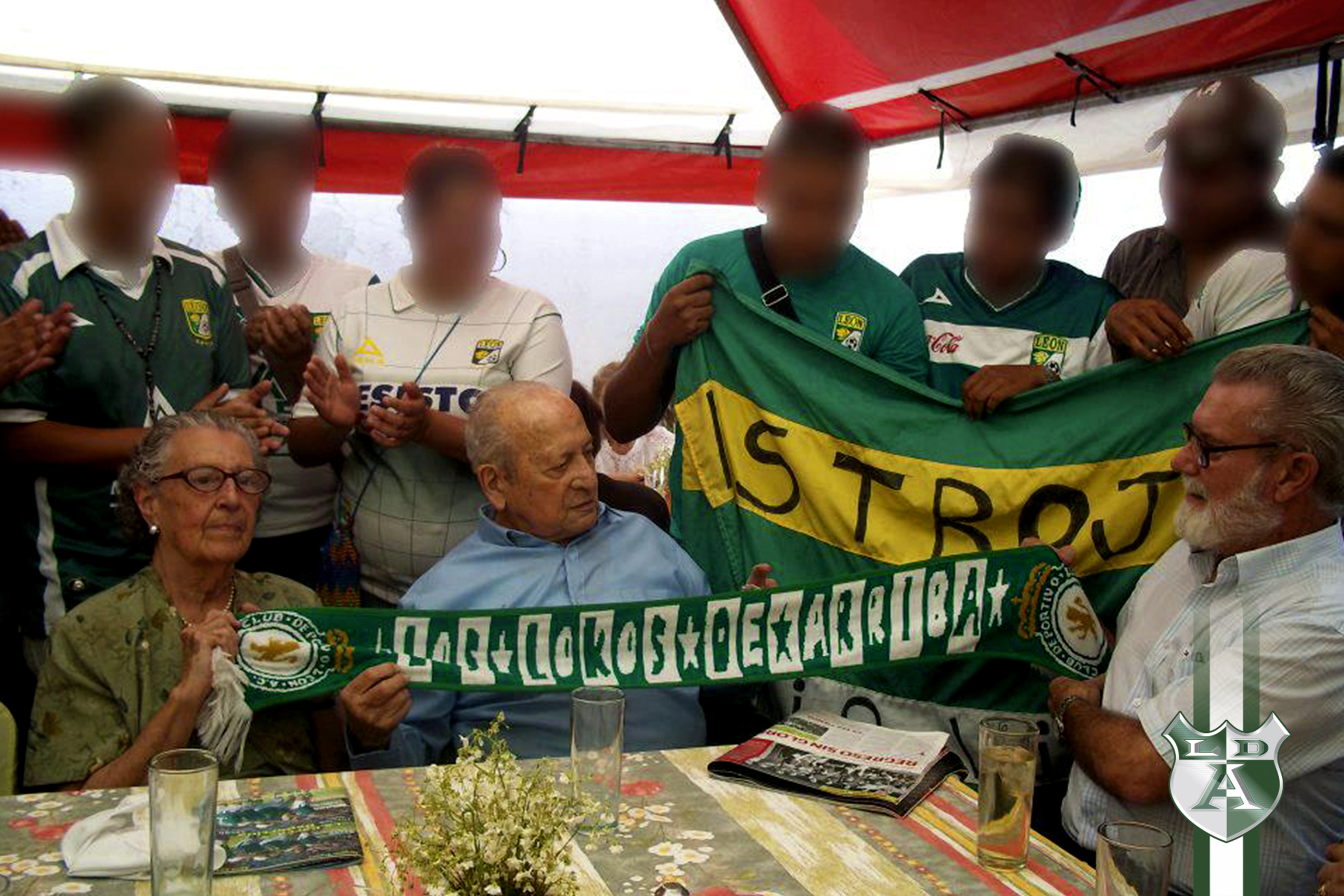 El Capi posando con hinchas del Club León